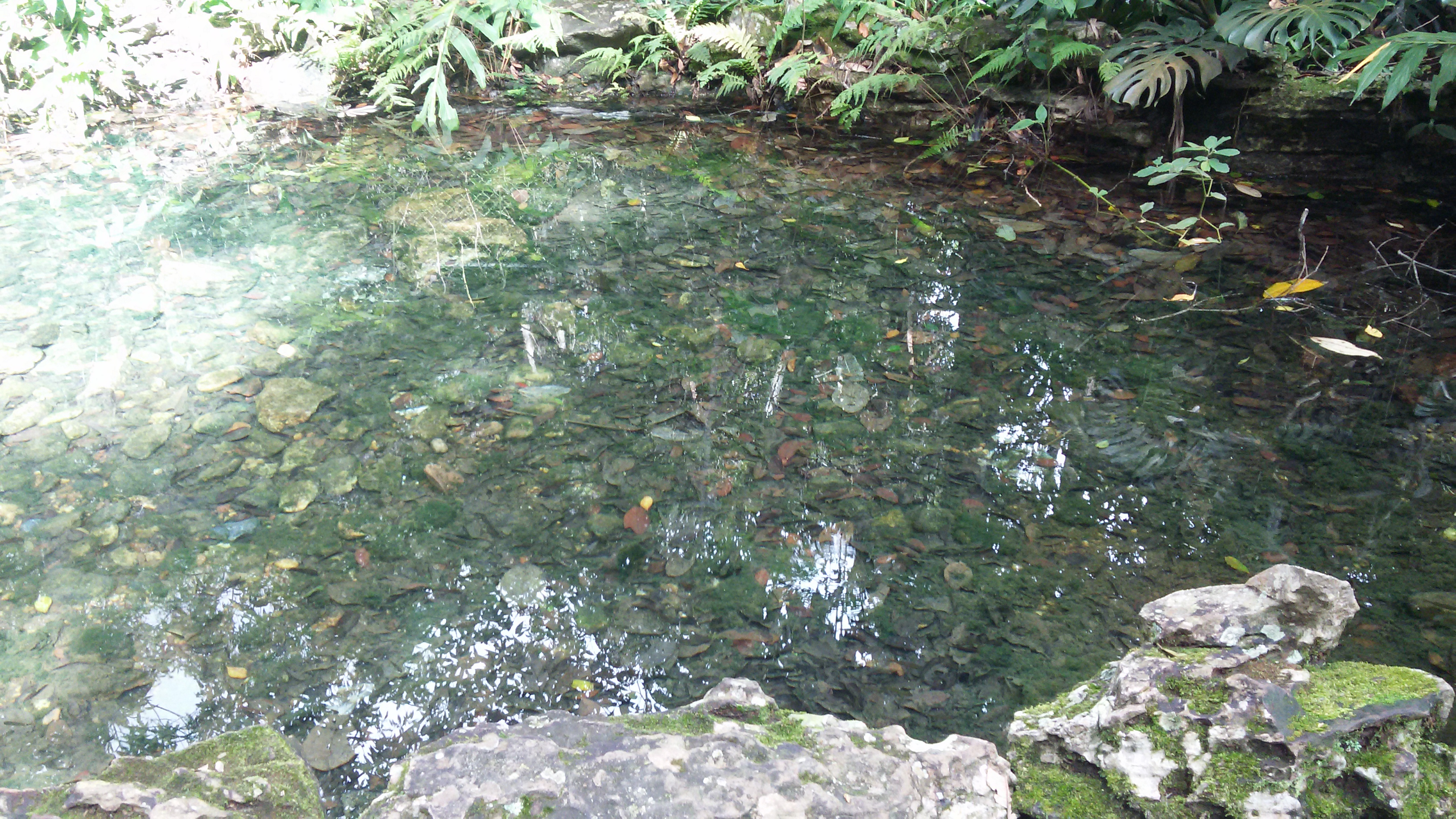 el pequeño lago con peces es muy acojedor